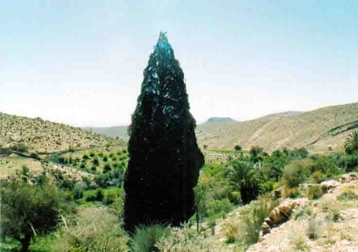 سرو 1700 ساله رحمت آباد جویم